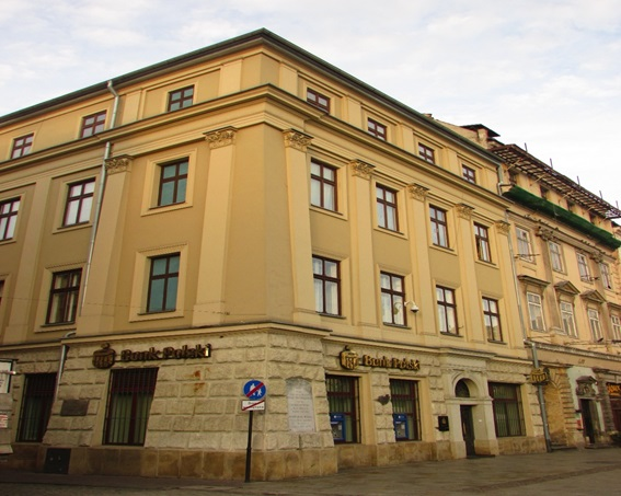 будинок